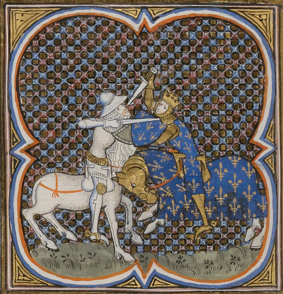 « Combat singulier entre le roi Clotaire II et Bertoald ». Grandes Chroniques de France de Charles V. France, Paris, XIVème siècle. 65 x 65 mm. Bibliothèque nationale de France.